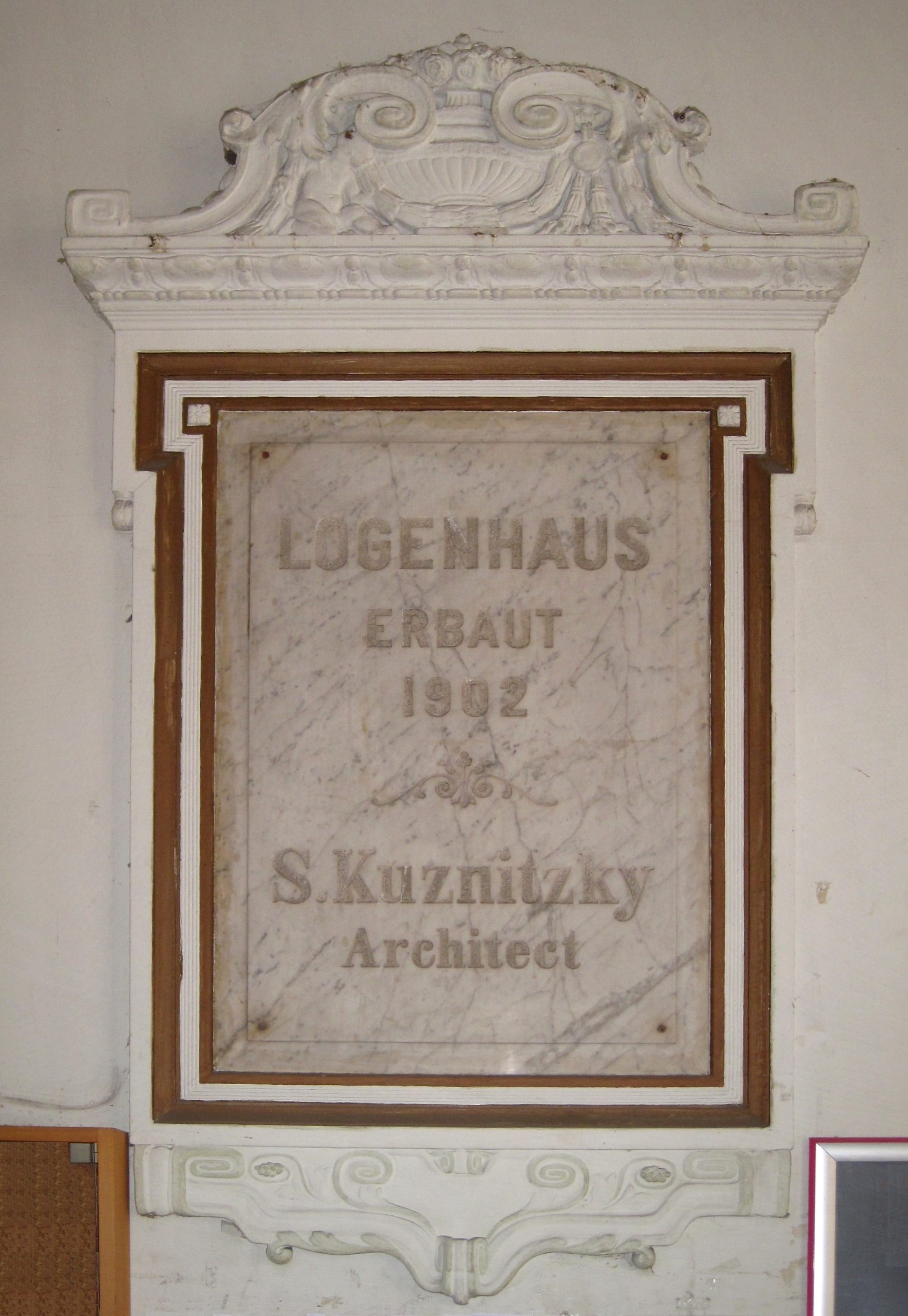 Tafel im ehemaligen Logenhaus (heute Synagoge) in Berlin-Charlottenburg, Joachimstaler Straße 13 (Hof). Erbaut 1902 von Siegfried Kuznitzky.